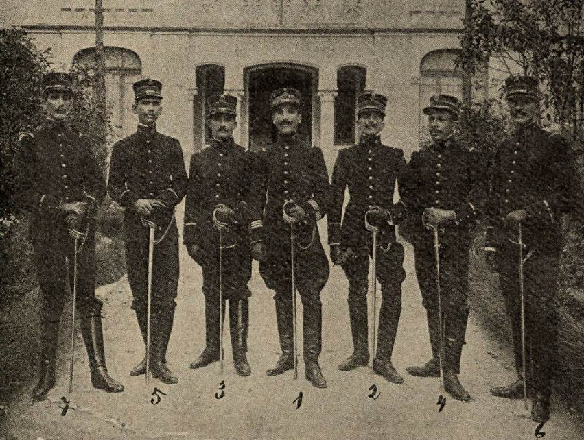 Auxiliares brasileiros da missão francesa, formados em frente ao quartel central. Conforme numerados: (1) capitão Francisco Júlio Cesar Alfieri, comandante da Companhia Escola; (2) Alferes Azarias Silva, comandante do pelotão de alunos cabos; (3) Alferes Alfredo R. de Castro, comandante da 1º seção de metralhadoras; (4) Alferes Luiz Miguel da Costa, idem 2, seção de metralhadoras; (5) Alferes Salvador Maia, idem da 1ª, seção de recrutas; (6) Alferes Genesio de Castro e Silva, idem da 2ª seção, 1º cia do 4º batalhão; (7) Alferes Octavio Galvão, idem da 2ª seção, 1ª cia, do 1º batalhão.